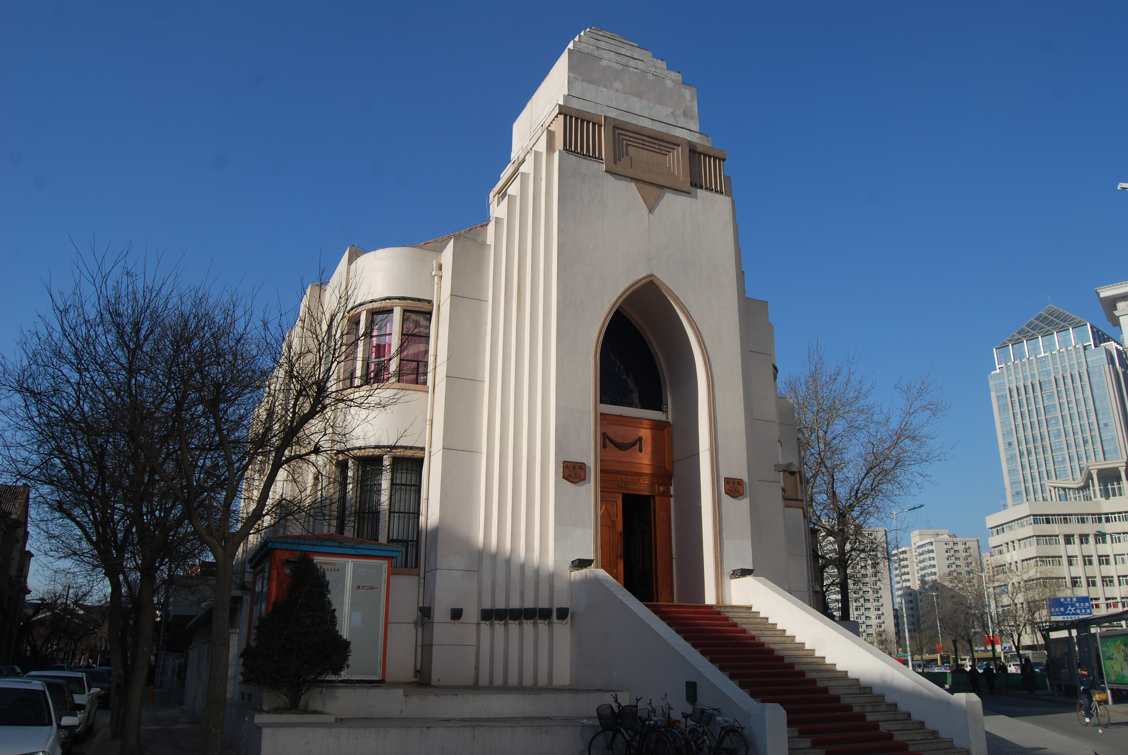 天津市历史风貌建筑